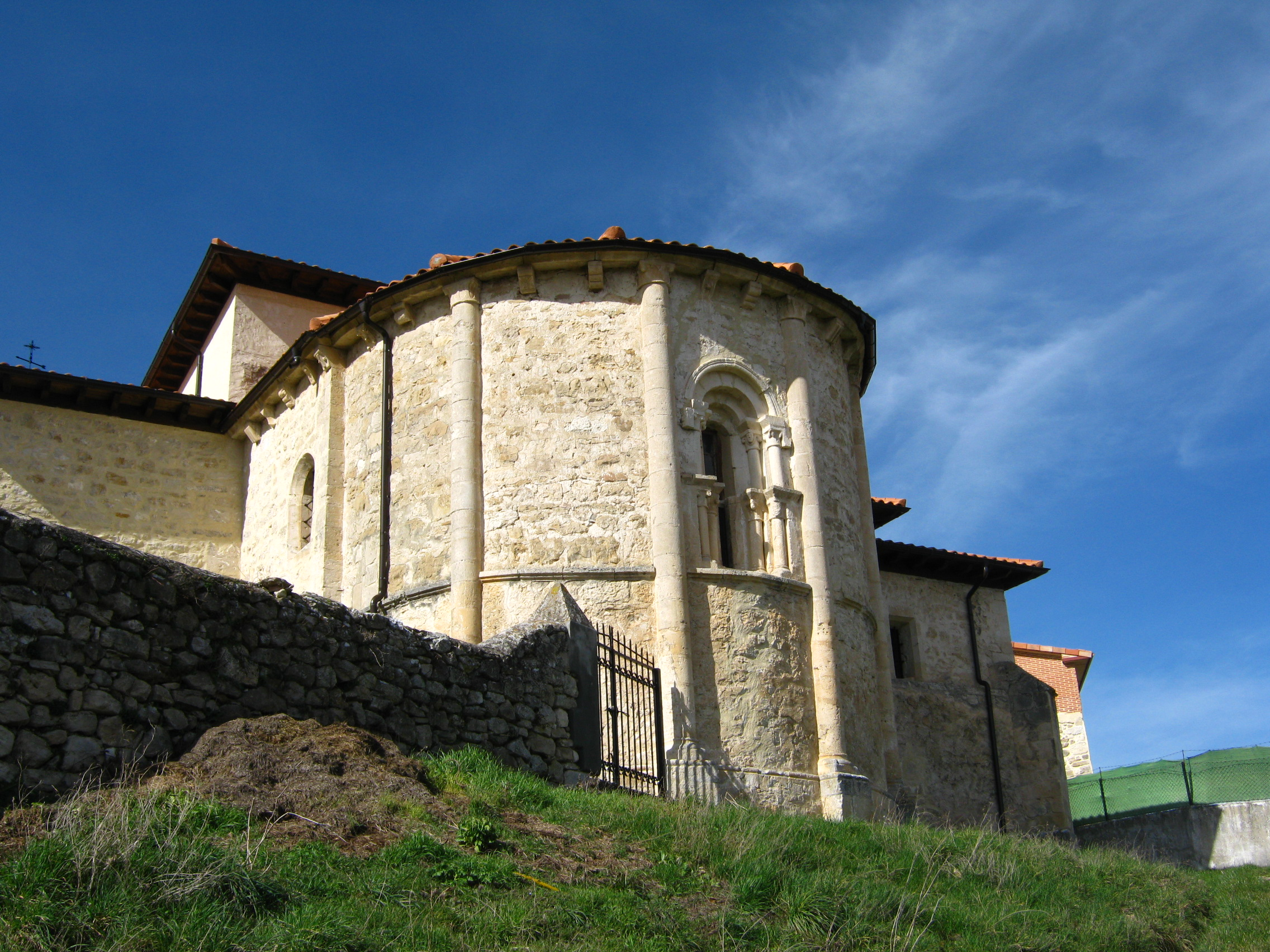 Ábside románico de la iglesia de Criales, en la comarca de las Merindades (Burgos, Castilla la Vieja)